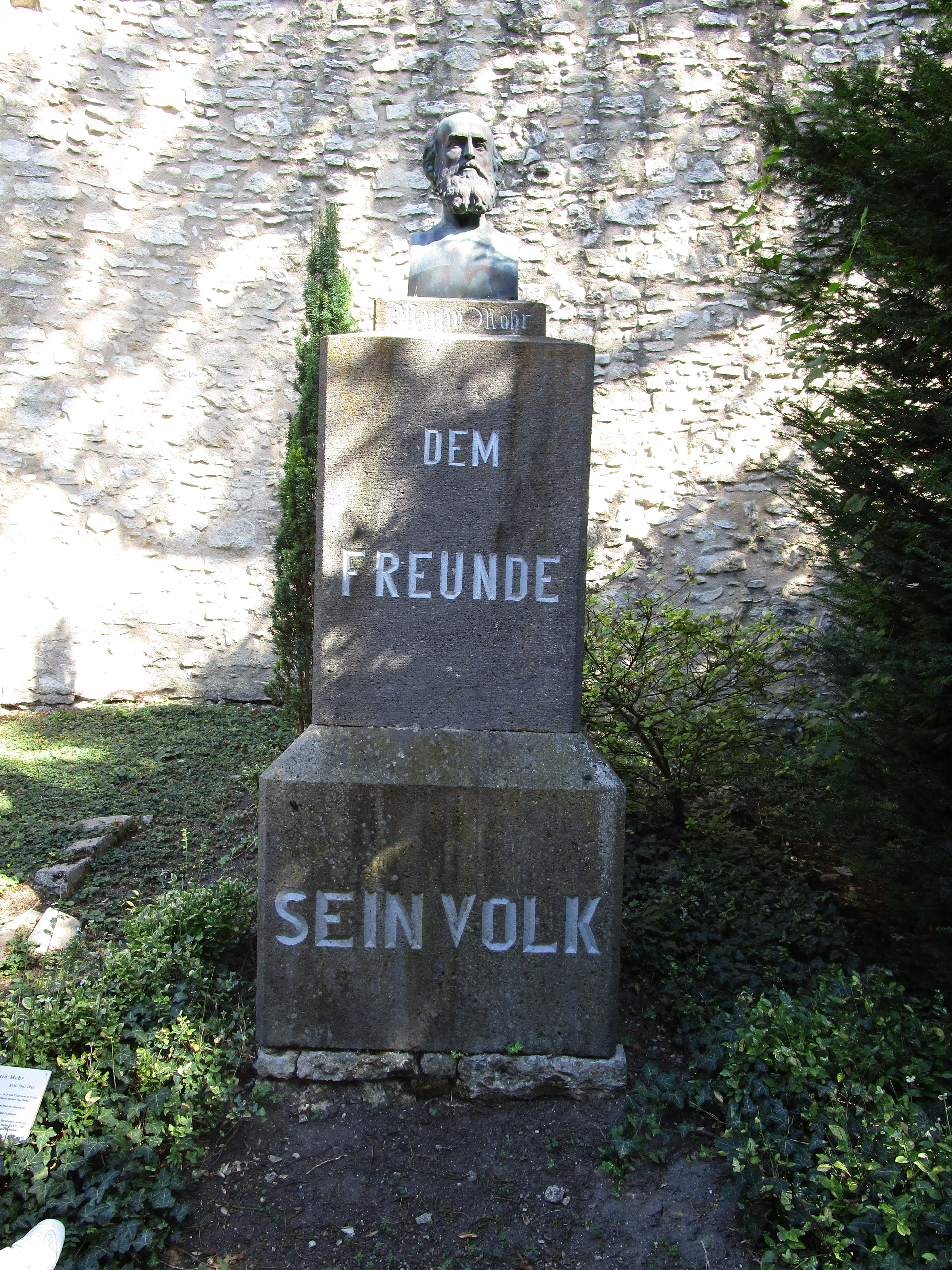 Martin Mohr 1788-1865 Abgeordneter der Frankfurter Nationalversammlung und Präsident der zweiten Kammer der hessischen Landstände in Darmstadt